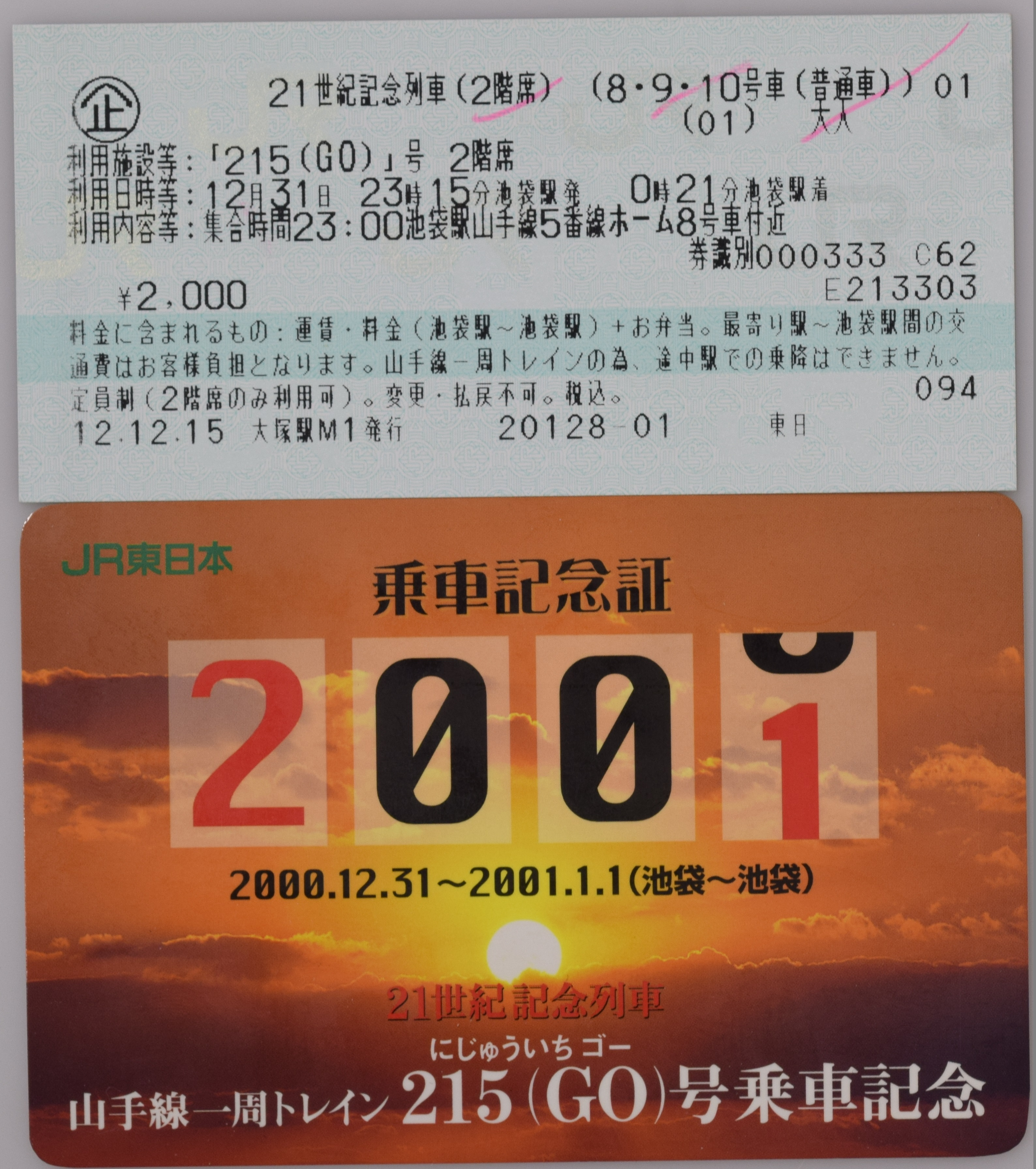 西暦2000年(ﾐﾚﾆｱﾑ)の大晦日に山手線一周を走った21世紀記念列車「215(Go)号」の乗車整理券と乗車記念証